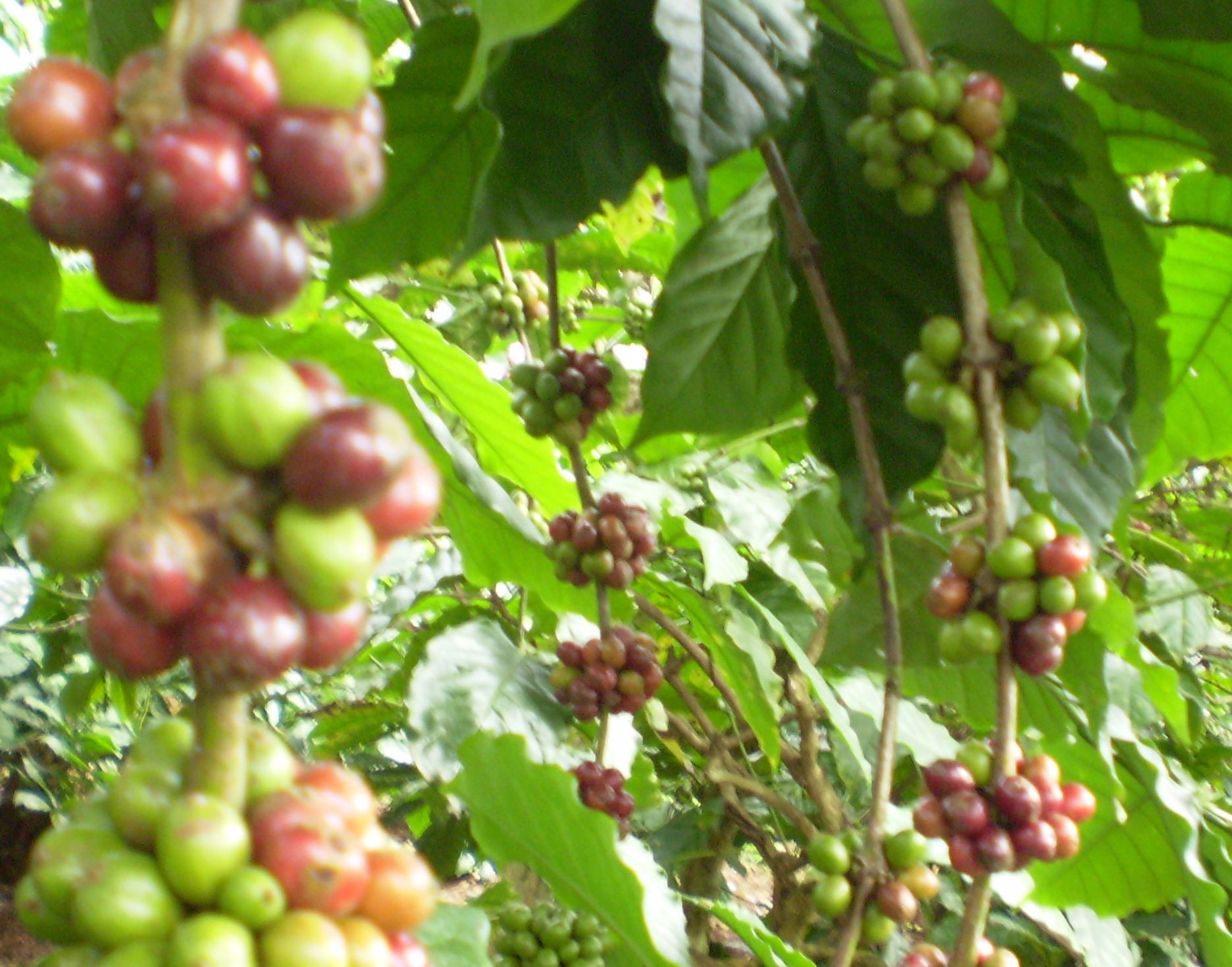 Trái cà phê vối ở Buôn Mê Thuột